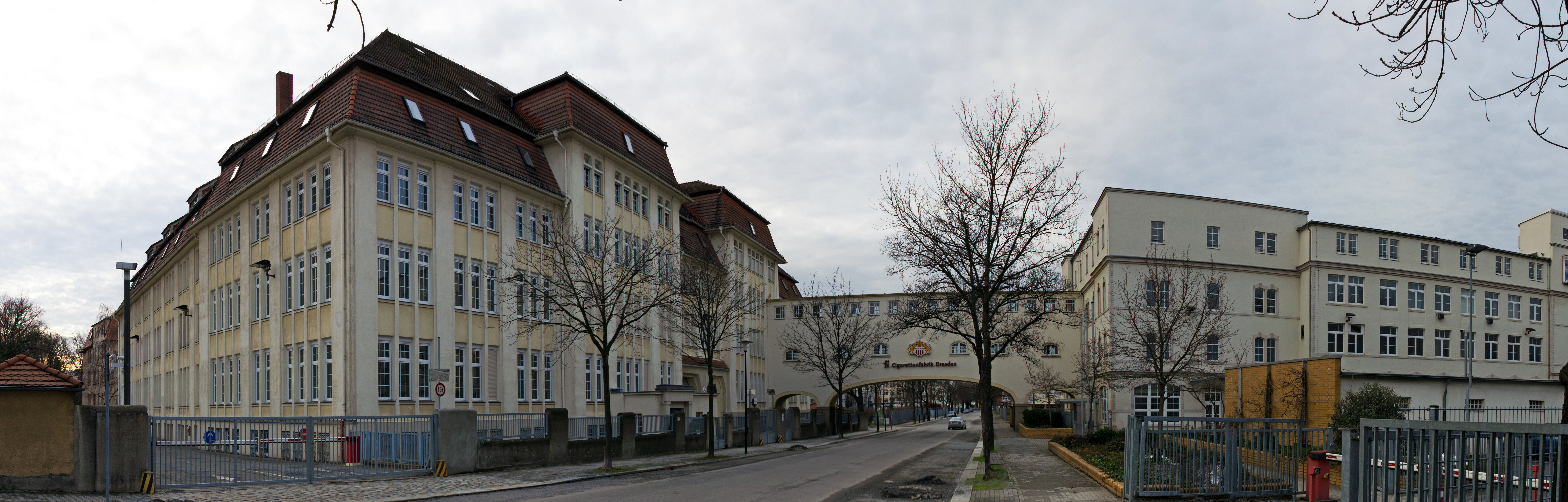 Zigarettenfabrik Jasmatzi, Dresden. Ostseite